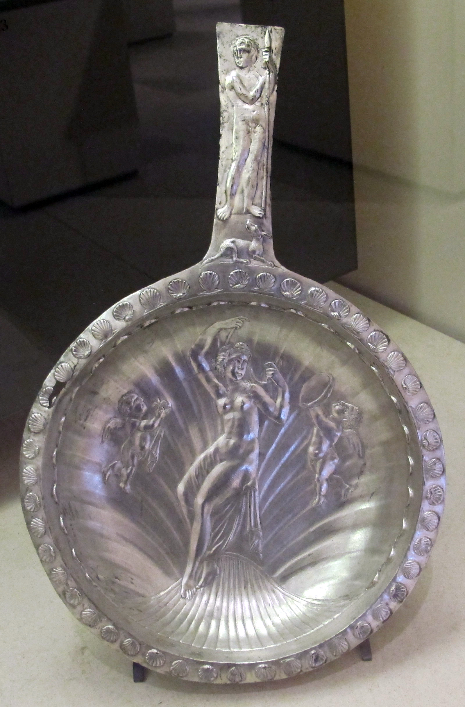 Arte romana al Petit Palais, Parigi